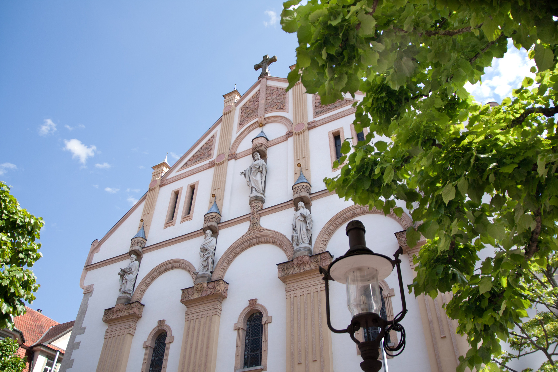 Jugendstilfassade der Stadtkirche